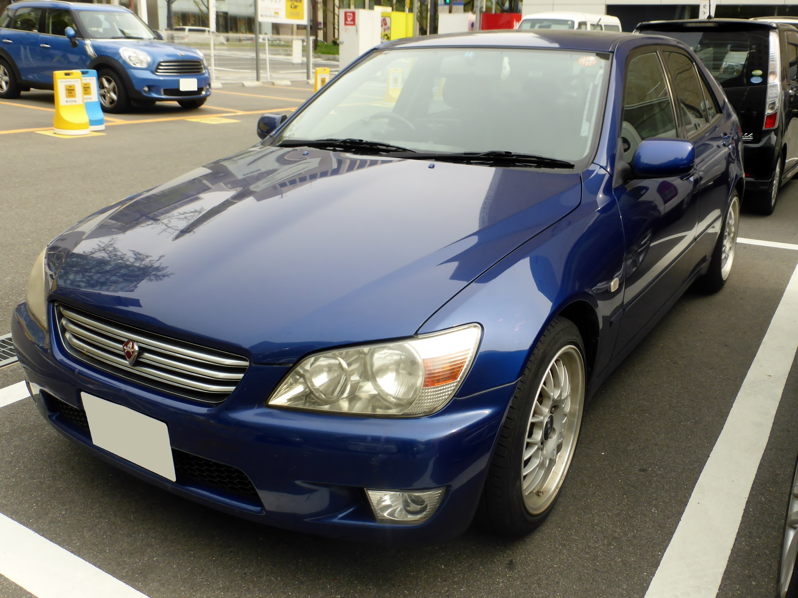 SXE10型トヨタ・アルテッツァRS200をフロントから撮影。